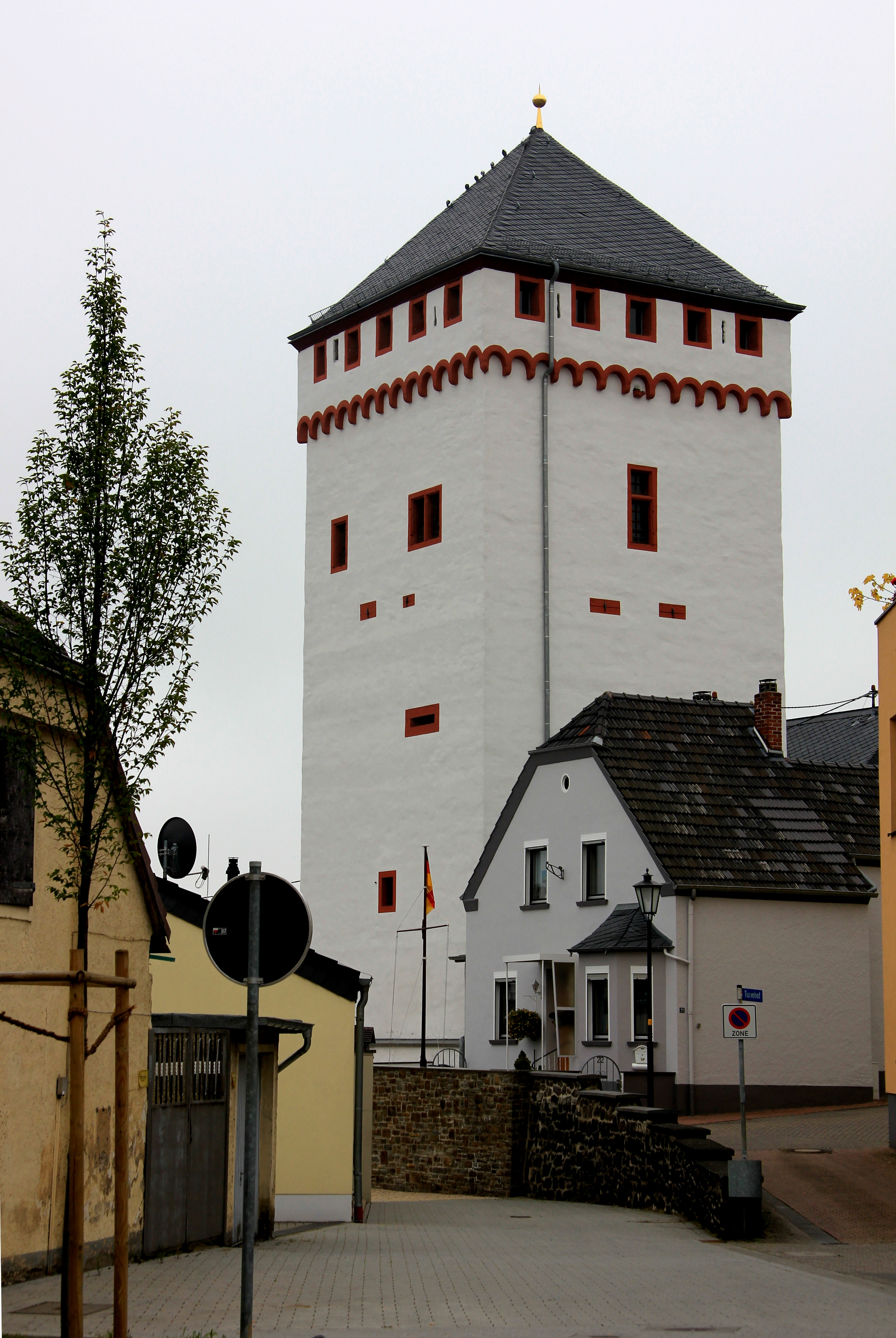 Weißer Turm in Weißenthurm, Kreis Mayen-Koblenz, ehemaliger Grenzturm zwischen Kurtrier und Kurköln